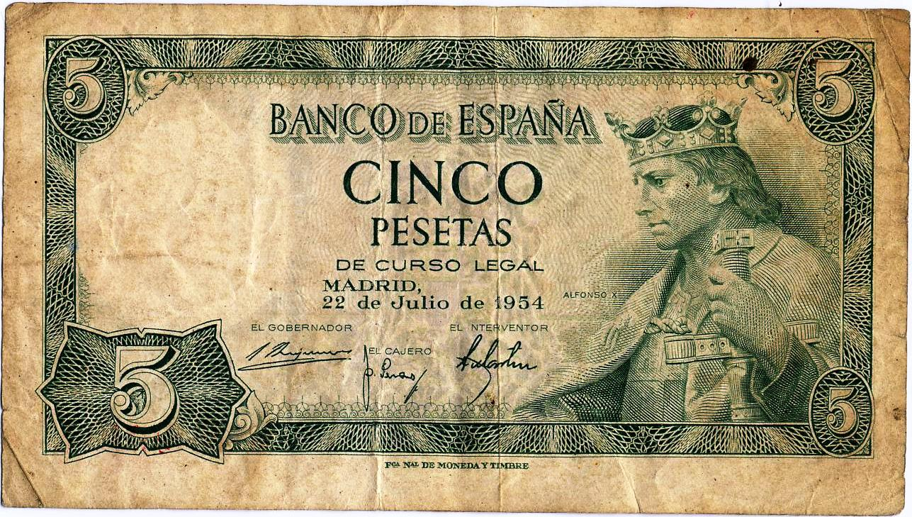 5 pesetas, 22 de julio de 1954, Alfonso X.